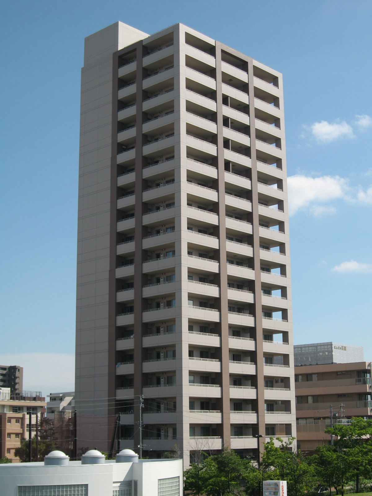 新潟県新潟市中央区。ライズ万代タワーの画像。